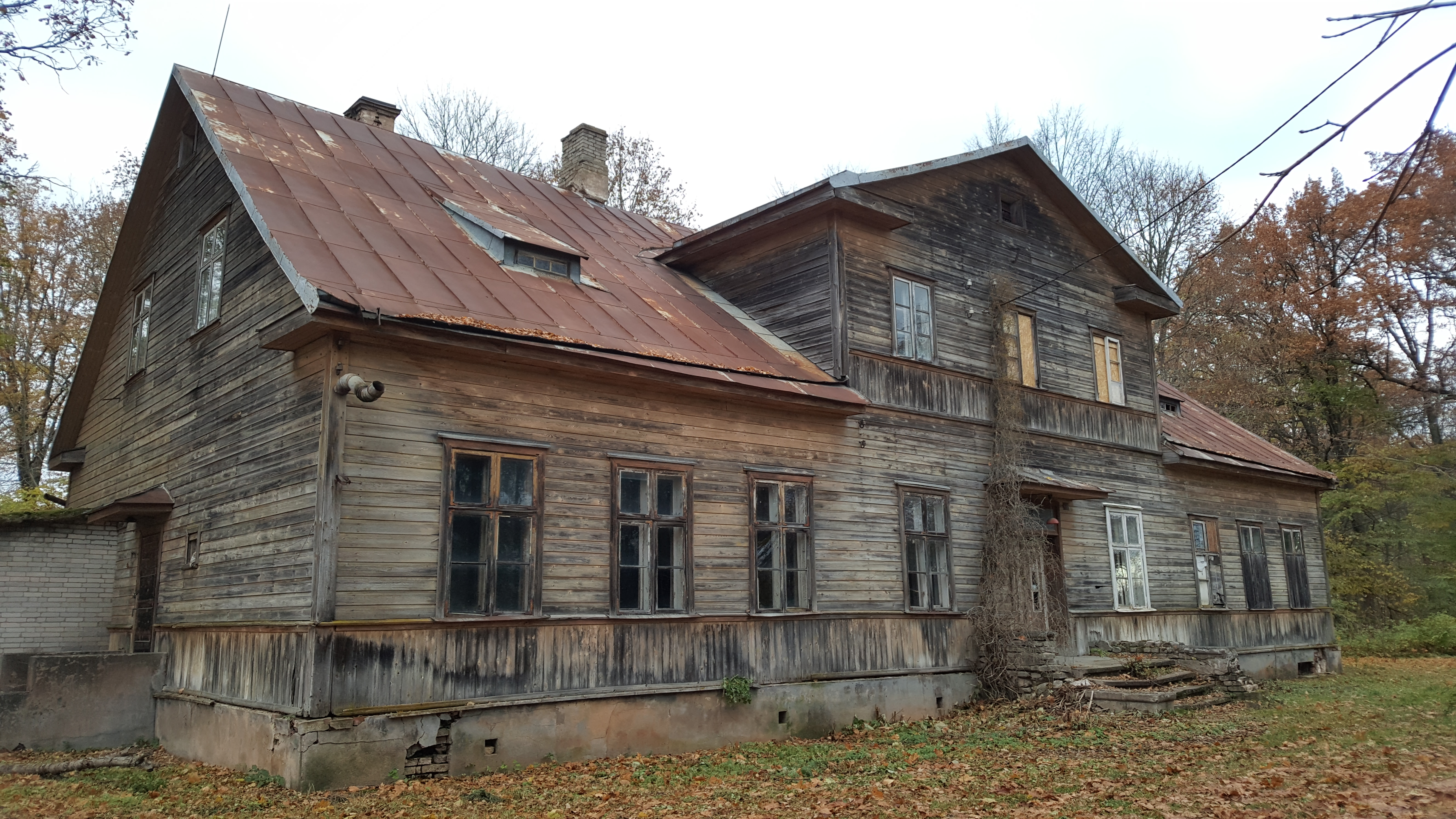 Kriimani mõisa peahoone esikülg 2017. aastal